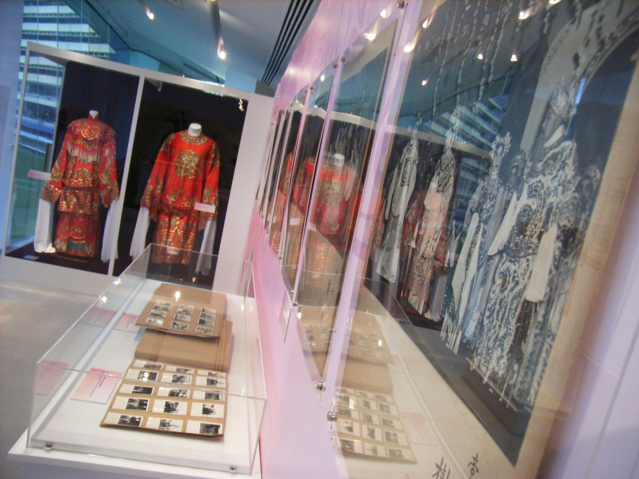 2006年2月28日至6月30日香港中文大學中國音樂資料館藏品展 之 任劍輝 白雪仙 「仙鳳鳴劇團」 外部参考